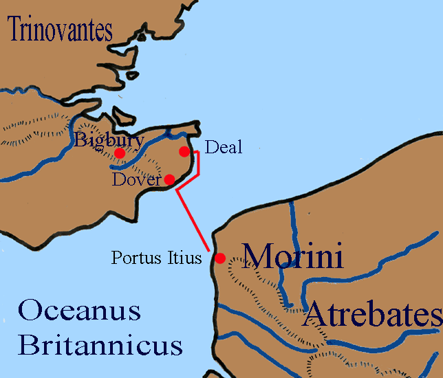 Jul Kaezar. -55